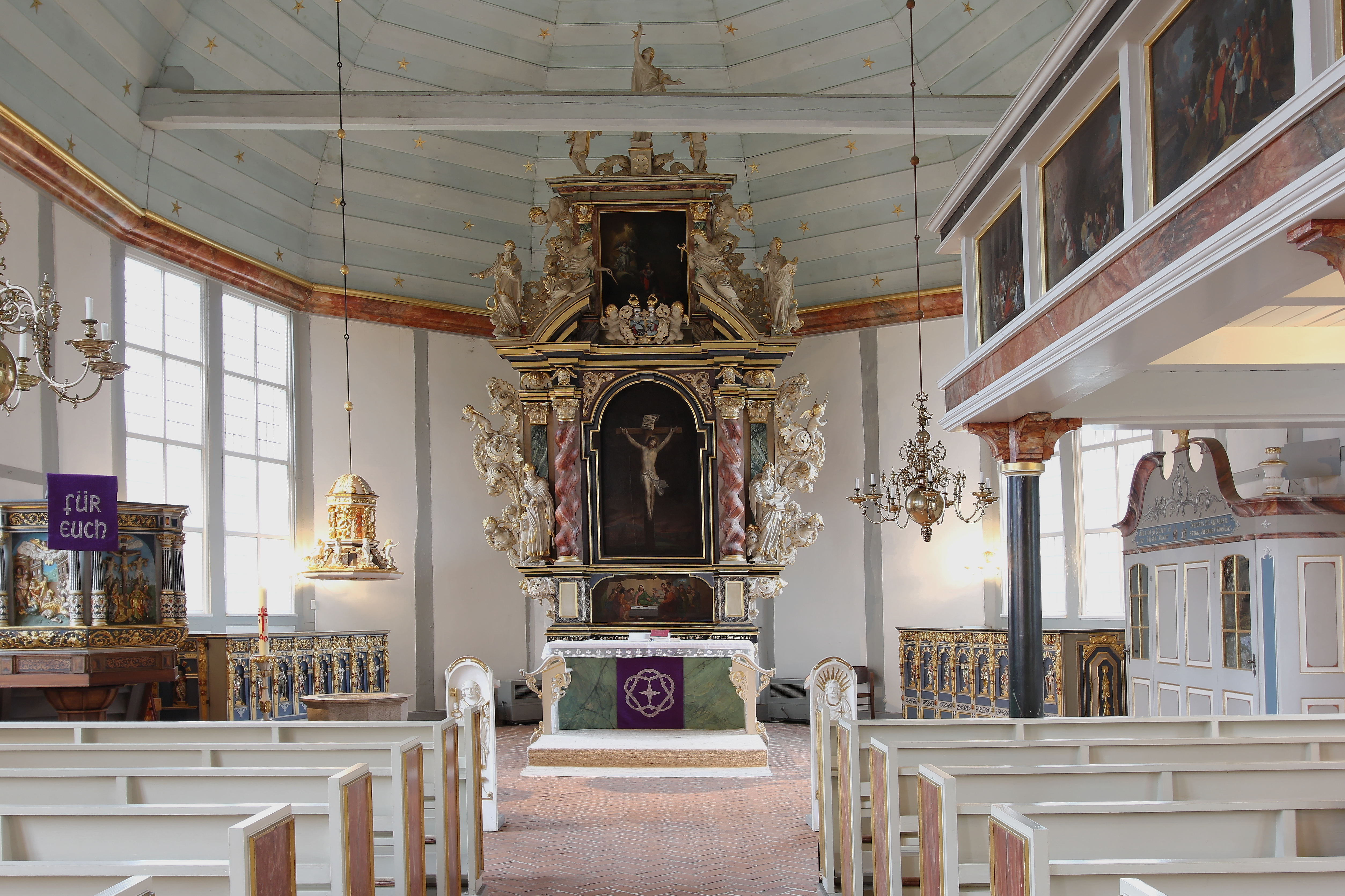 St. Nikolai, Hamburg-Moorfleet, Innenraum, Blick zum Altar